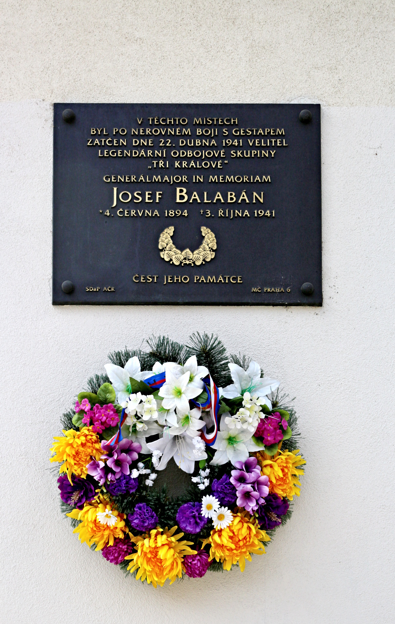 Praha-Dejvice, pamětní deska Josefa Balabána